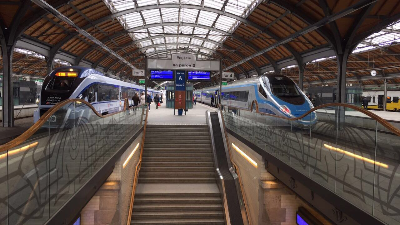 Peron 2, Wrocław Główny